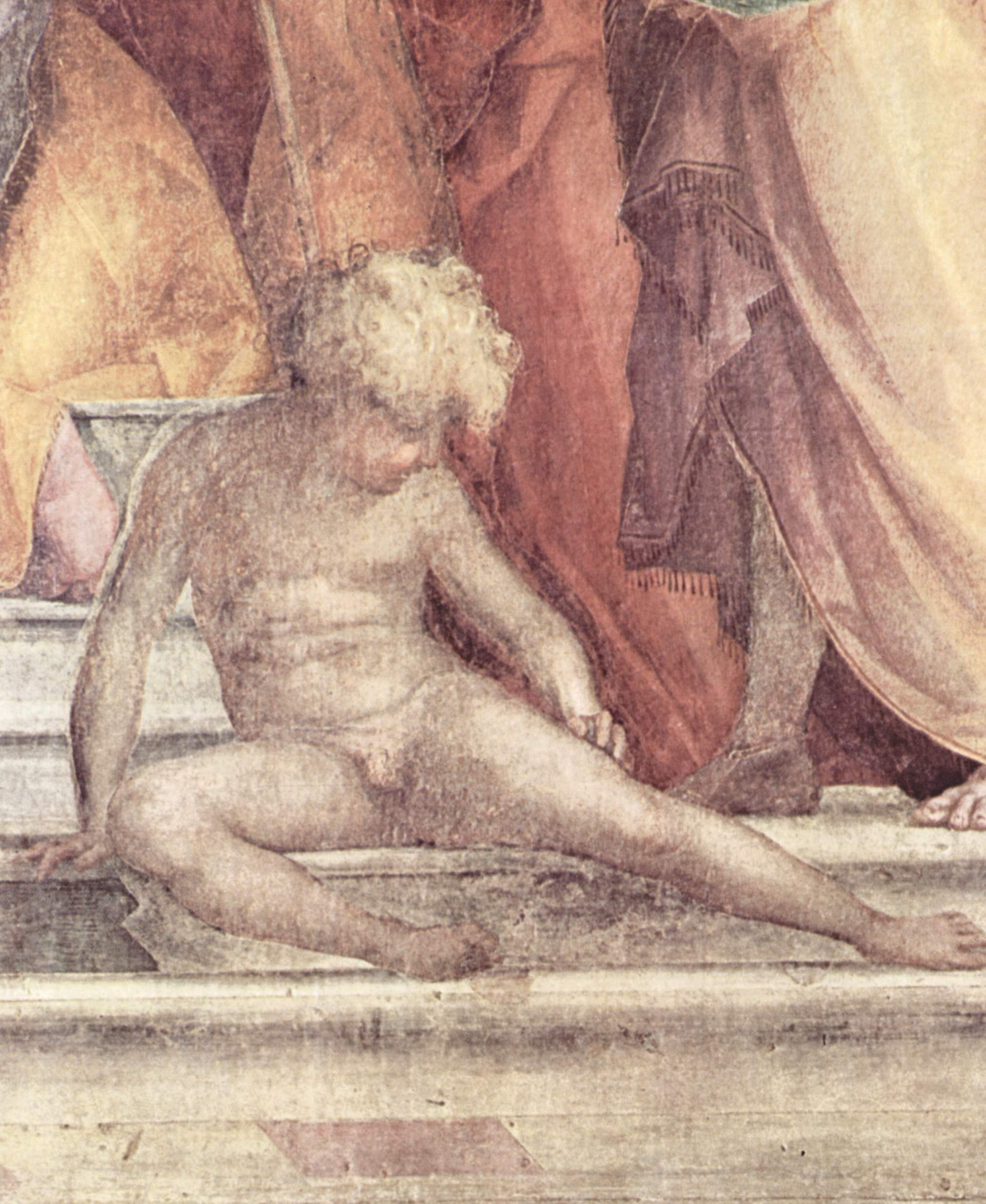 detail